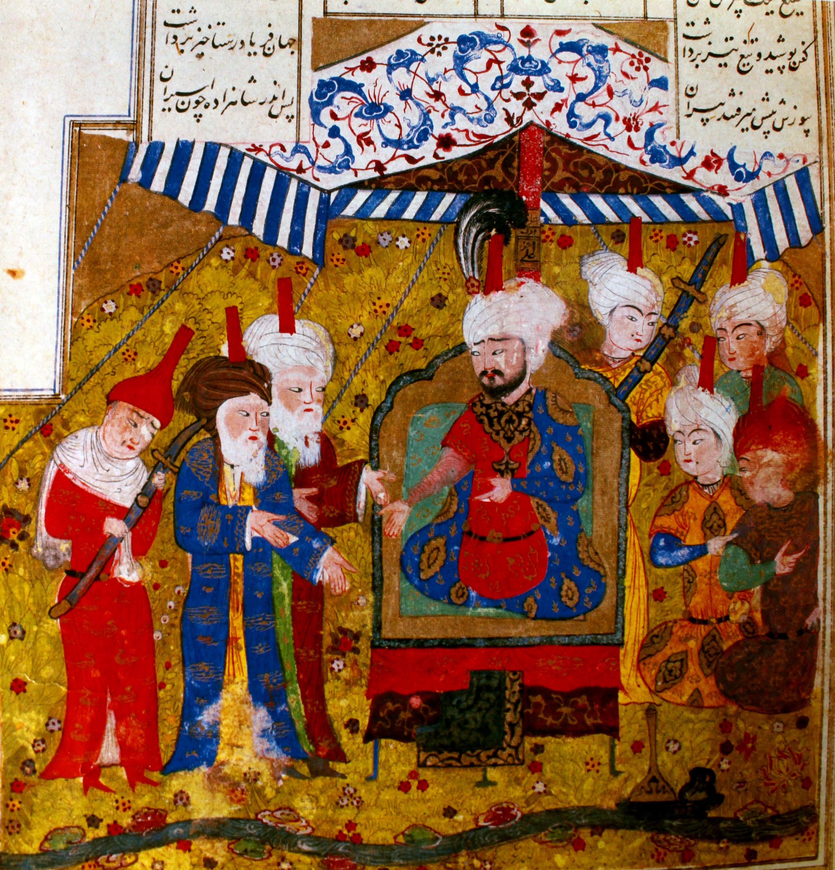 Xosrovun atasından üzr istəməsi. 1508, Şiraz